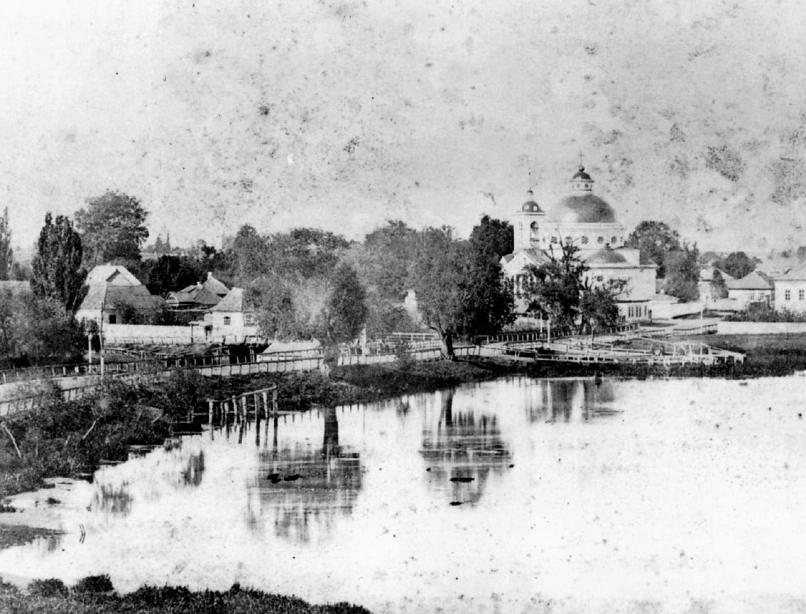 Вид на Церкву Різдва Пресвятої Богородиці на Веригині з центра Глухова